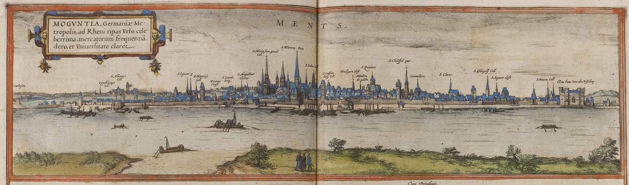 Mainz